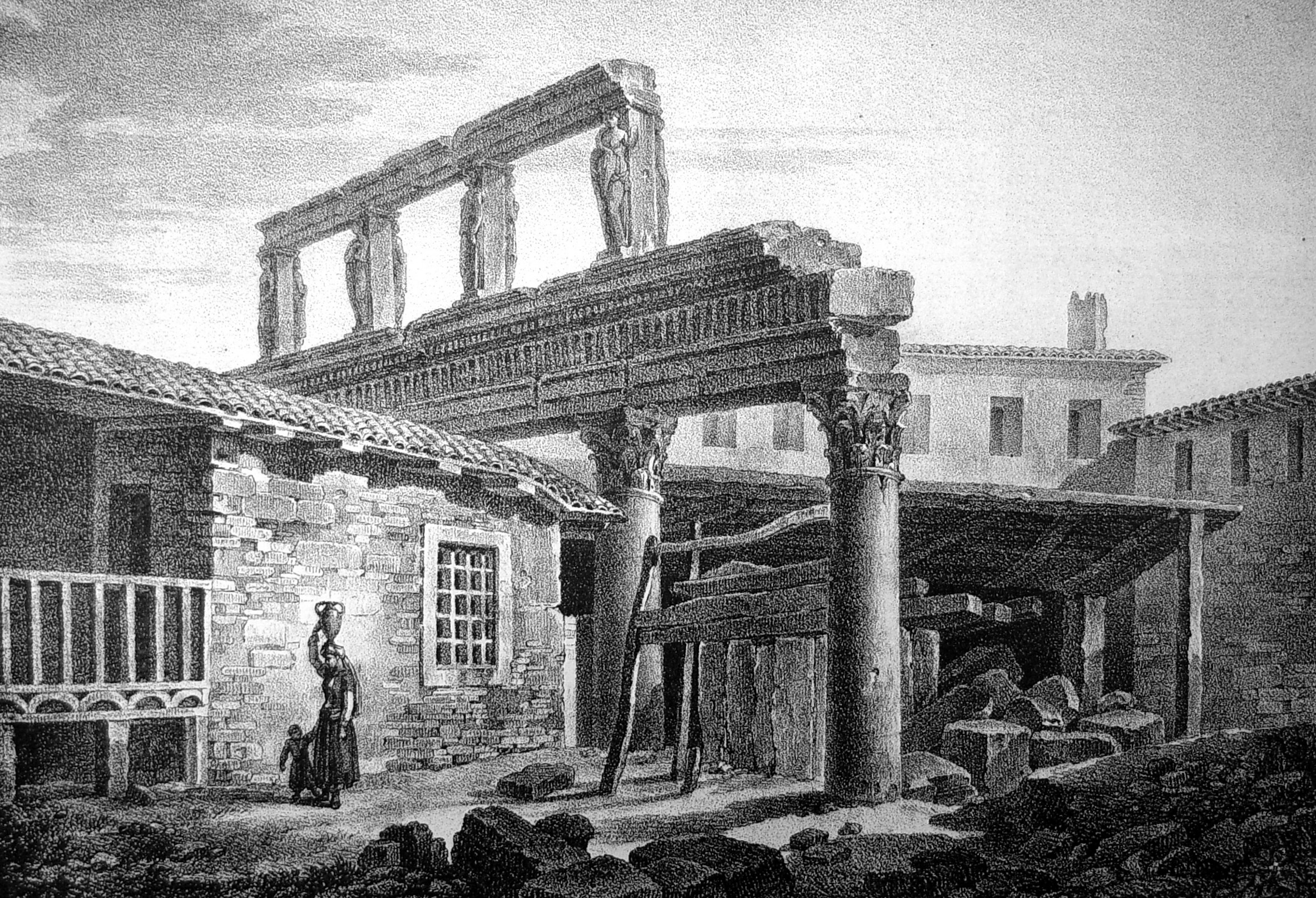 « Las Incantadas », portique de l'agora (?) de Thessalonique, vu en 1831.